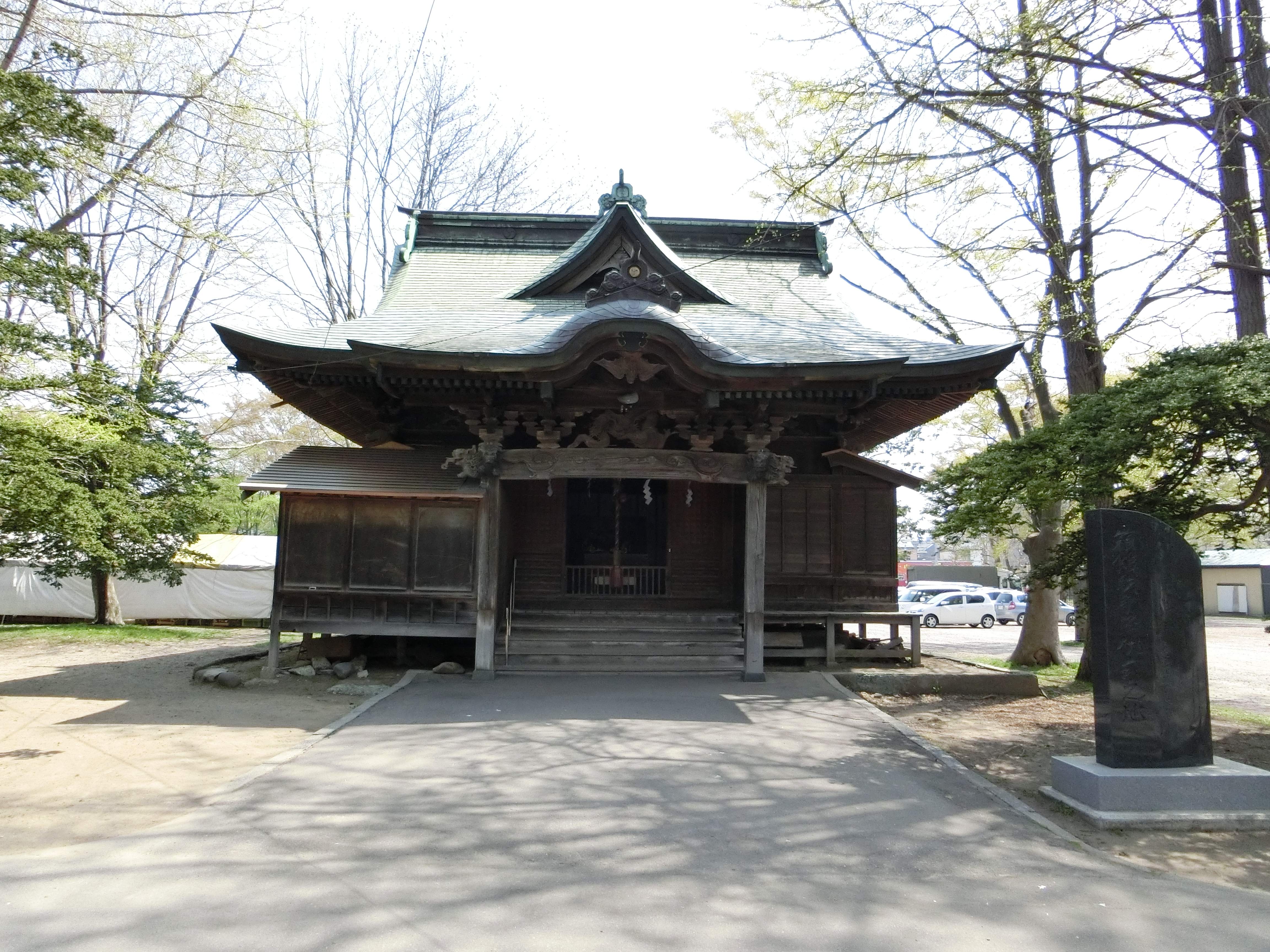 亀田八幡宮神輿殿（北海道函館市八幡町。文久2年築）